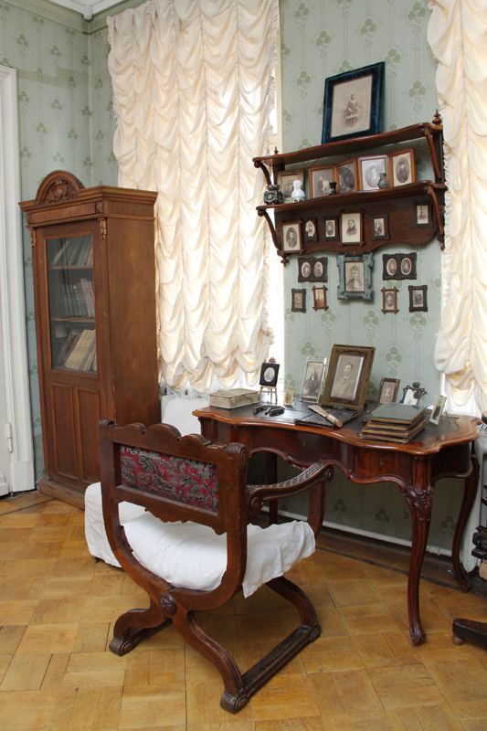 Вход в мемориальную квартиру-музей К. Тимирязева